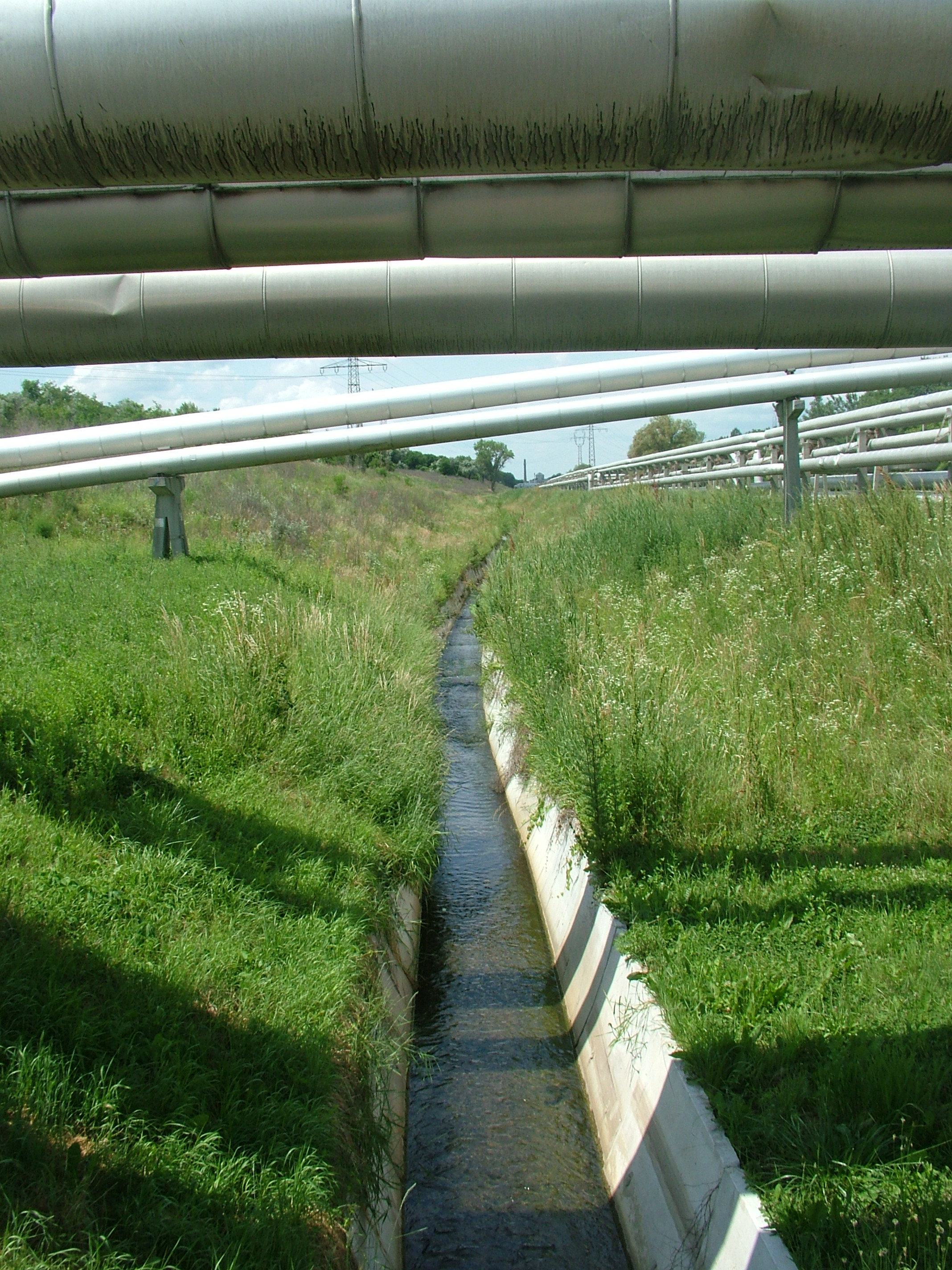 Pécs, Tüskésréti út mellett - Pécsi-víz, felette a távfűtés vezetéke - 2017. 06. 10.